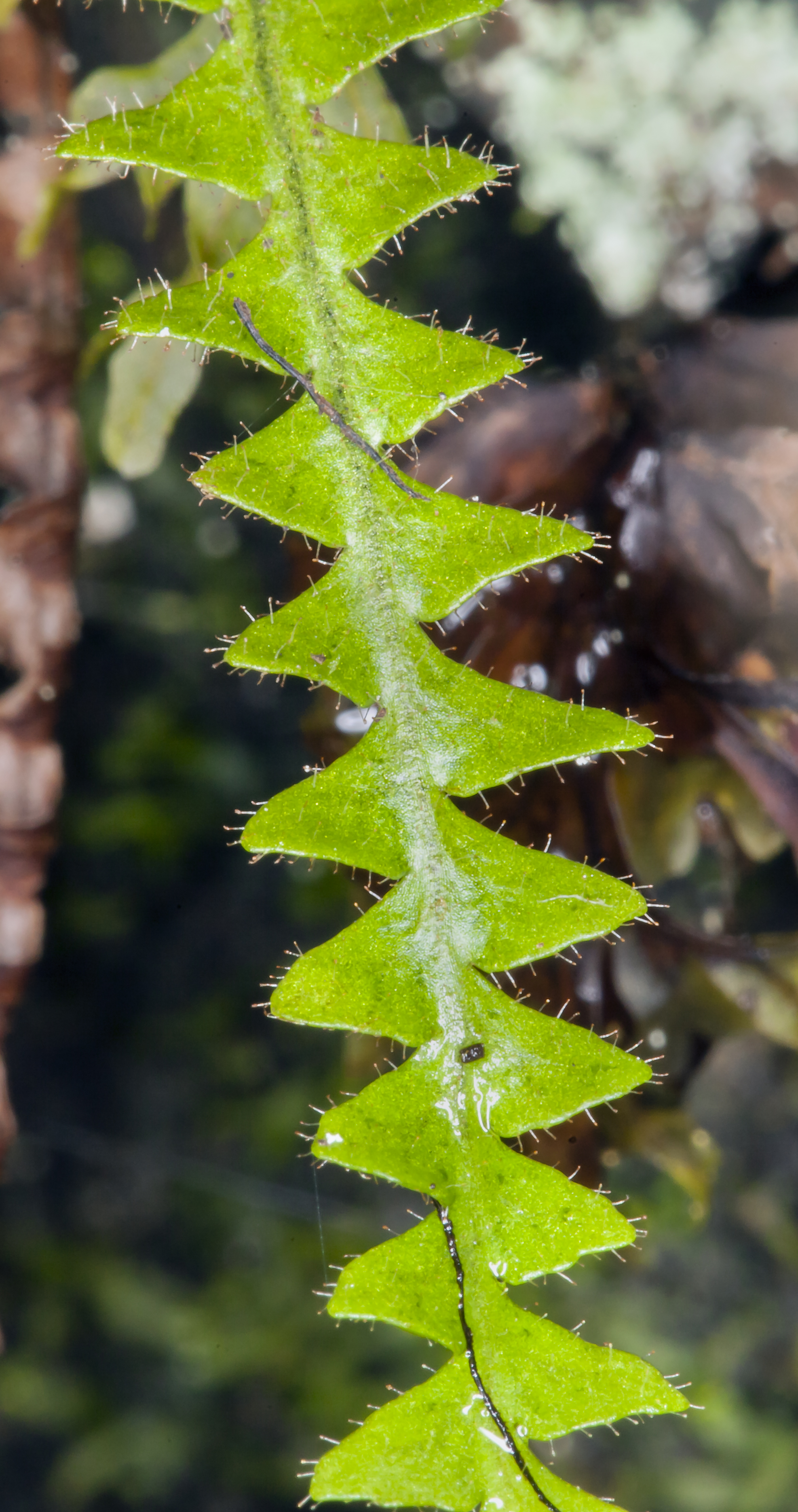 Adenophorus periens (pendant kihi fern)